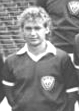 Title: Mannschaftsfoto BFC Dynamo Factual corrections and alternative descriptions are encouraged separately from the original description. Additionally errors can be reported at this page to inform the Bundesarchiv. Original historic description: ADN-ZB-Oberst-17.7.87-ma-Berlin: Fußball-Oberligasaison 1987-88. Die Mannschaft des neunfachen DDR-Meisters BFC Dynamo. Vorn von links: Jörg Fügner, Thomas Grether, die Torhüter Bodo Rudwaleit und Marco Kostmann, Marco Köller und Heiko Brestrich. Mittlere Reihe von links: verantwortlicher Trainer Jürgen Bogs, Waldemar Ksienzyk, Hendrik Herzog, Frank Rohde, Thomas Doll, Andreas Thoma, Eike Küttner, Christian Backs und Trainer Joachim Hall. Hintere Reihe von links: Bernd Schulz, Rainer Ernst, Burkhard Reich, Dirk Anders, Michael Schulz, Frank Pastor, Norbert Trieloff und Rainer Troppa.